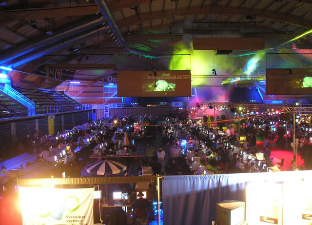 Afbeelding van LAN = LIFE 5 (ongeveer 500 van de 1020 deelnemers)